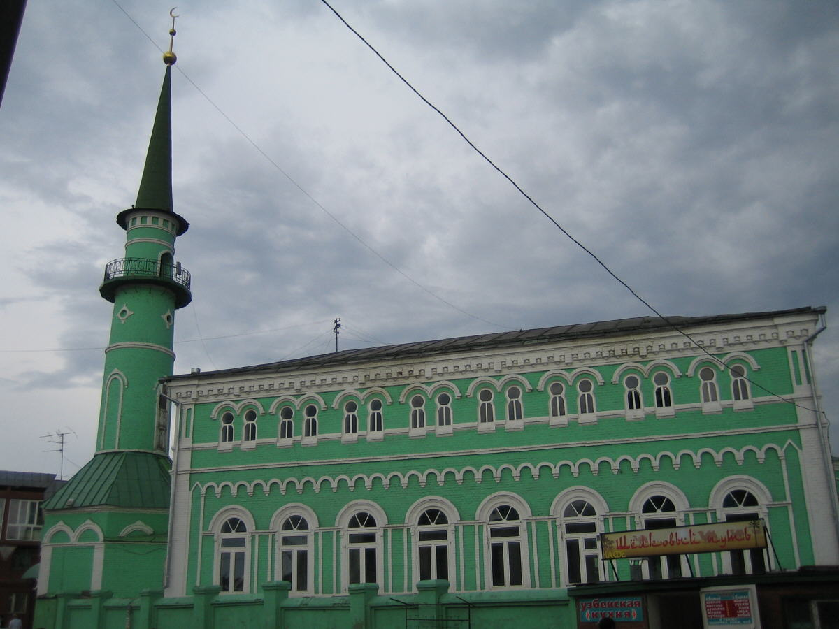 Султановская мечеть (18.06.2006)